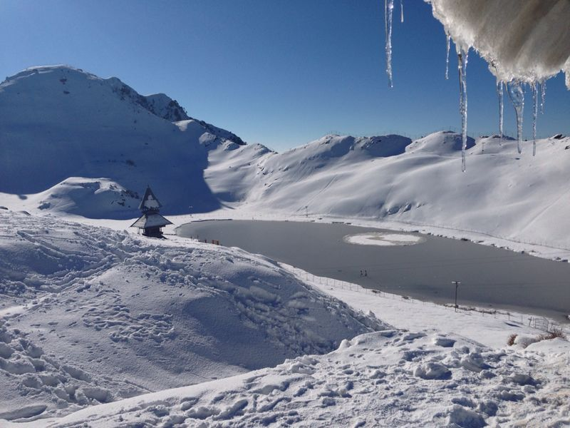 Parashar Lake-Mandi-Himachal Pradesh-India